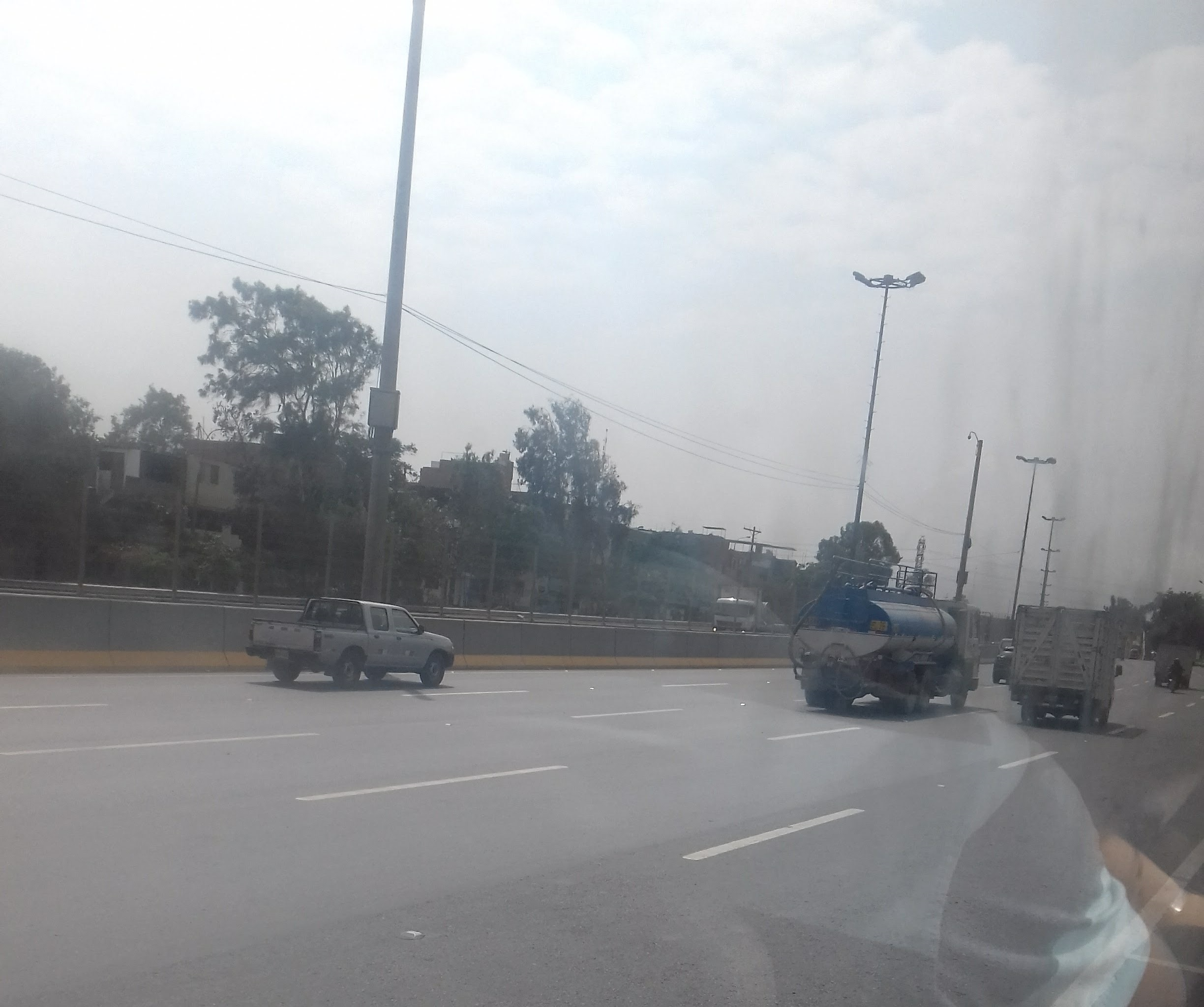 Autopista peruana